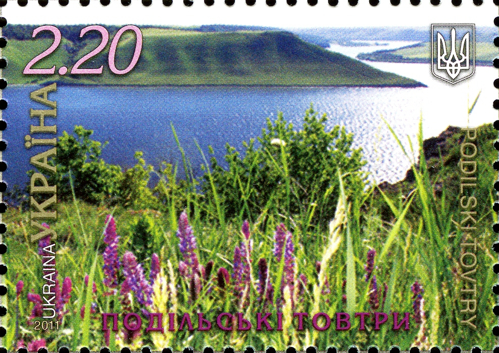 Подільські Товтри на марці, присвяченій проекту "Сім природніх чудес України"